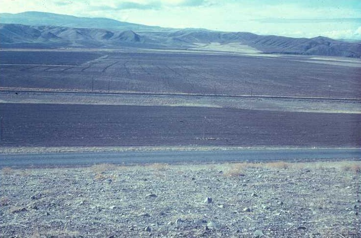 Delice river valey near Yeni Yapan, Kırıkkale.